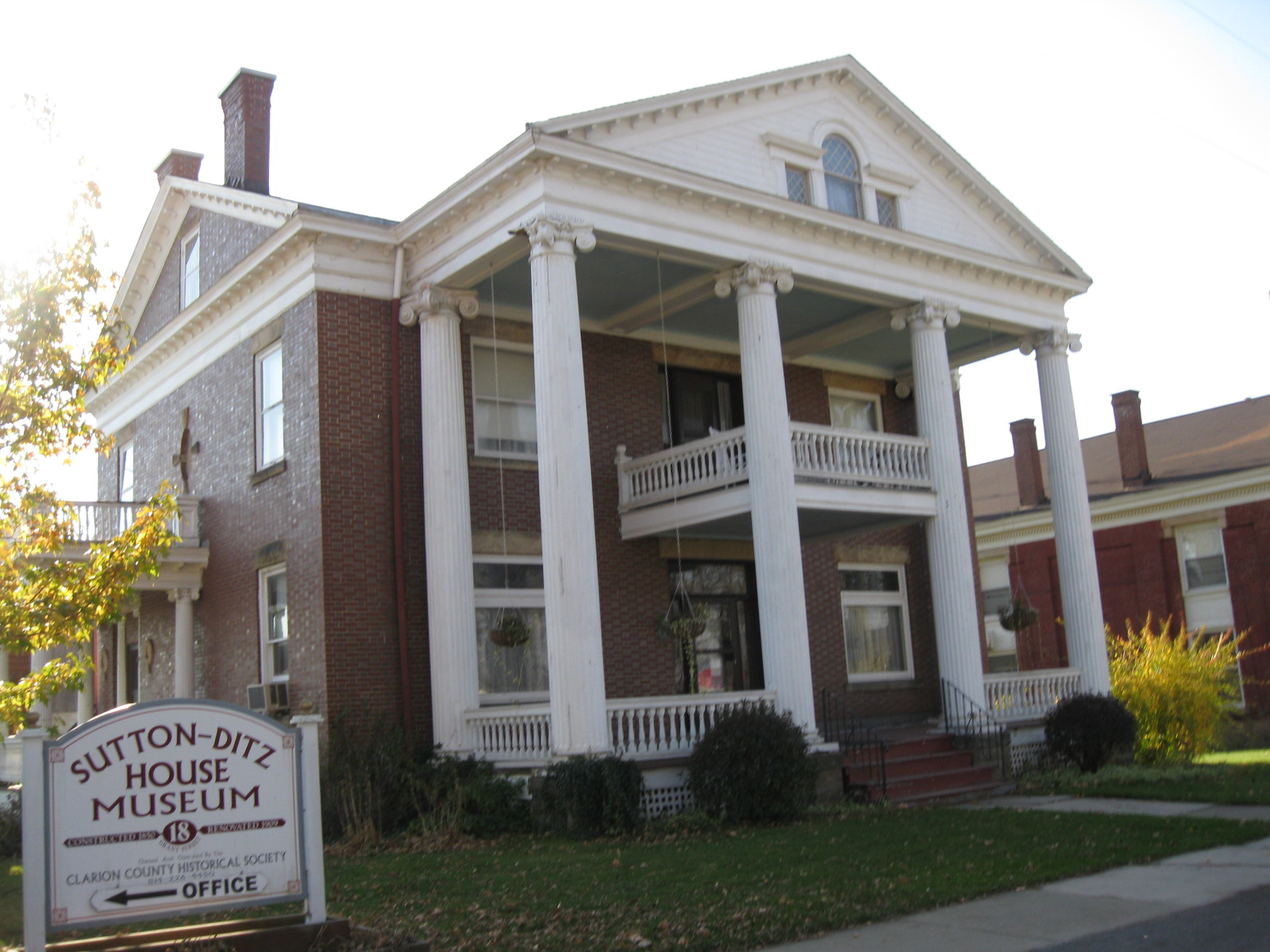 Clarion, Pennsylvania